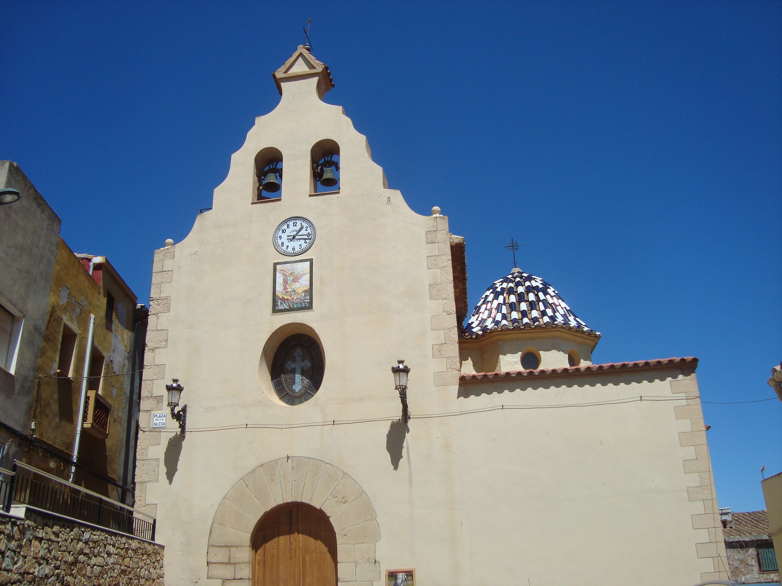 Església de Sant Miquel (l'Alcora) 04.005-008.